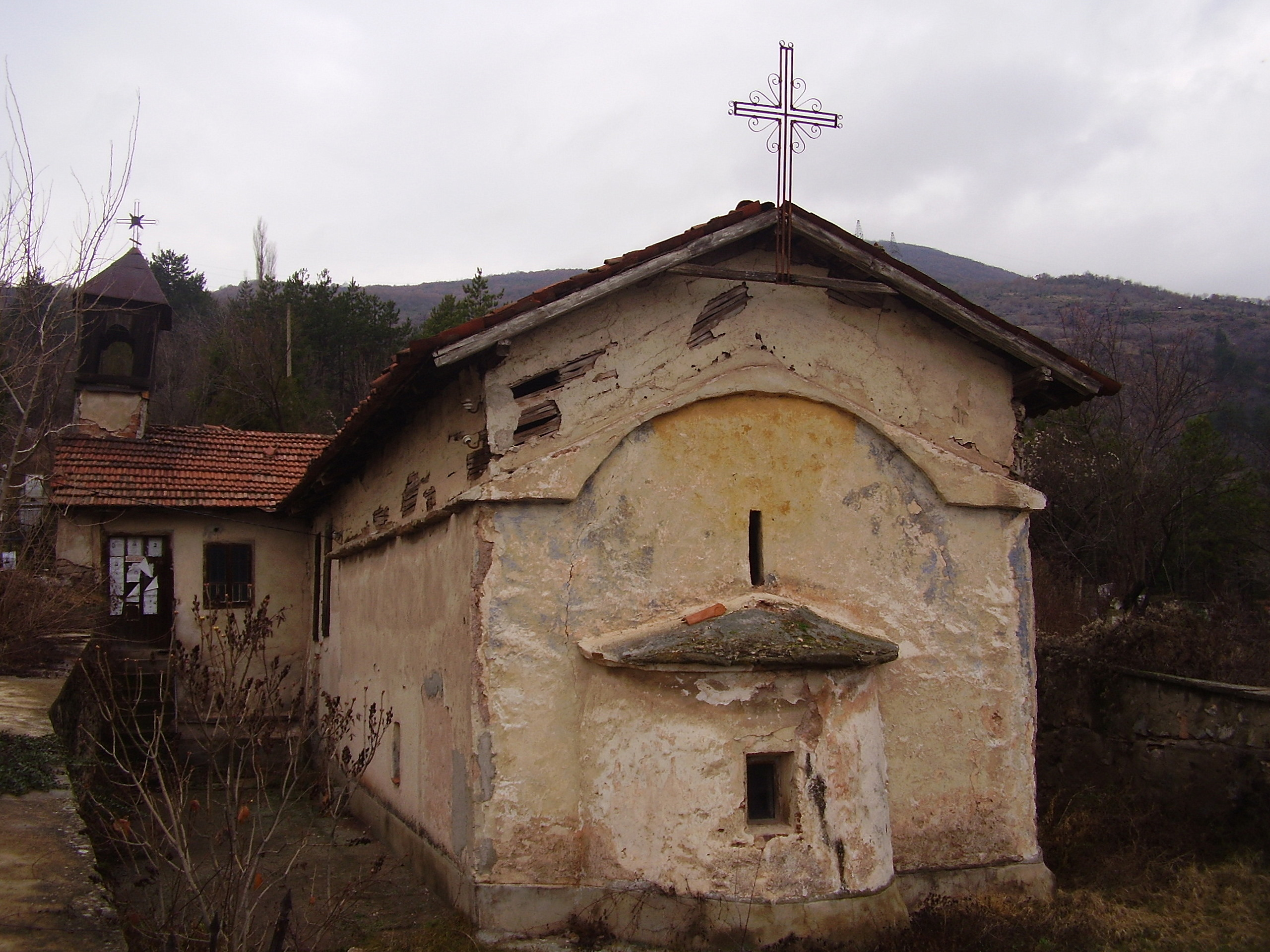 Късносредновековна църква Свети Атанасий - гр.Бобошево